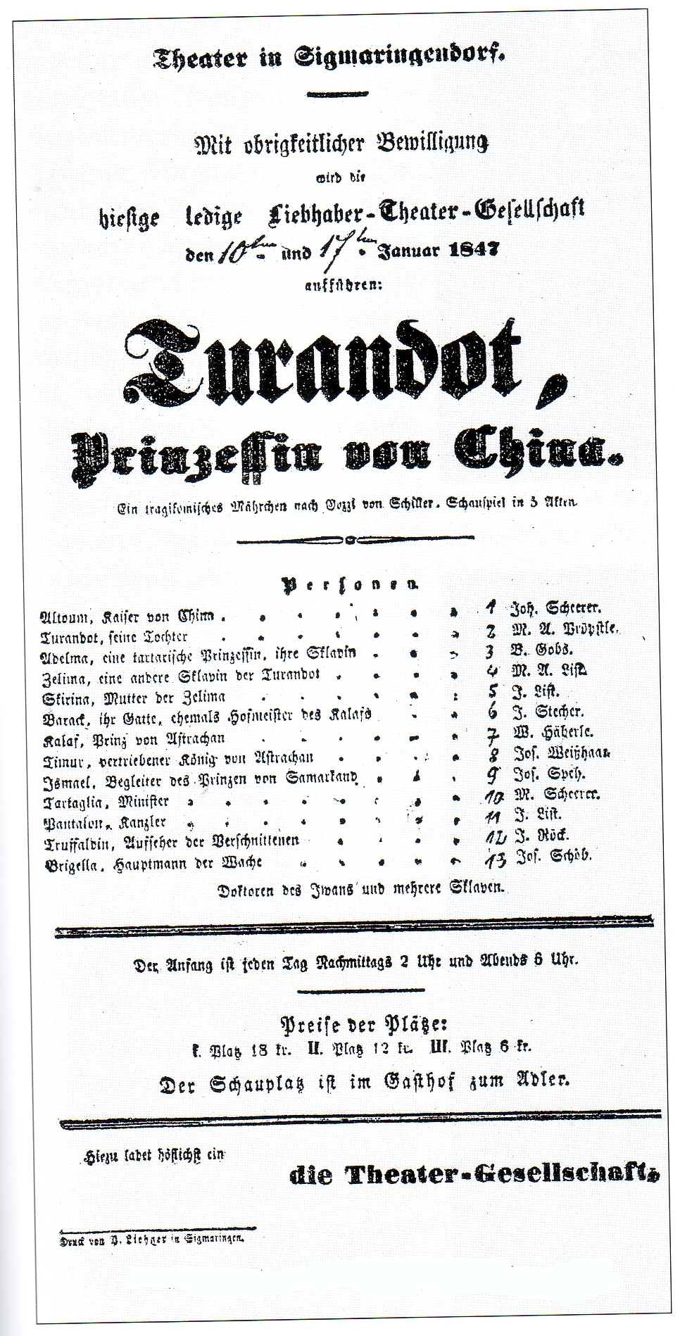 Theatereinladung der Ledigen Liebhaber-Theatergesellschaft Sigmaringendorf aus dem Jahre 1847